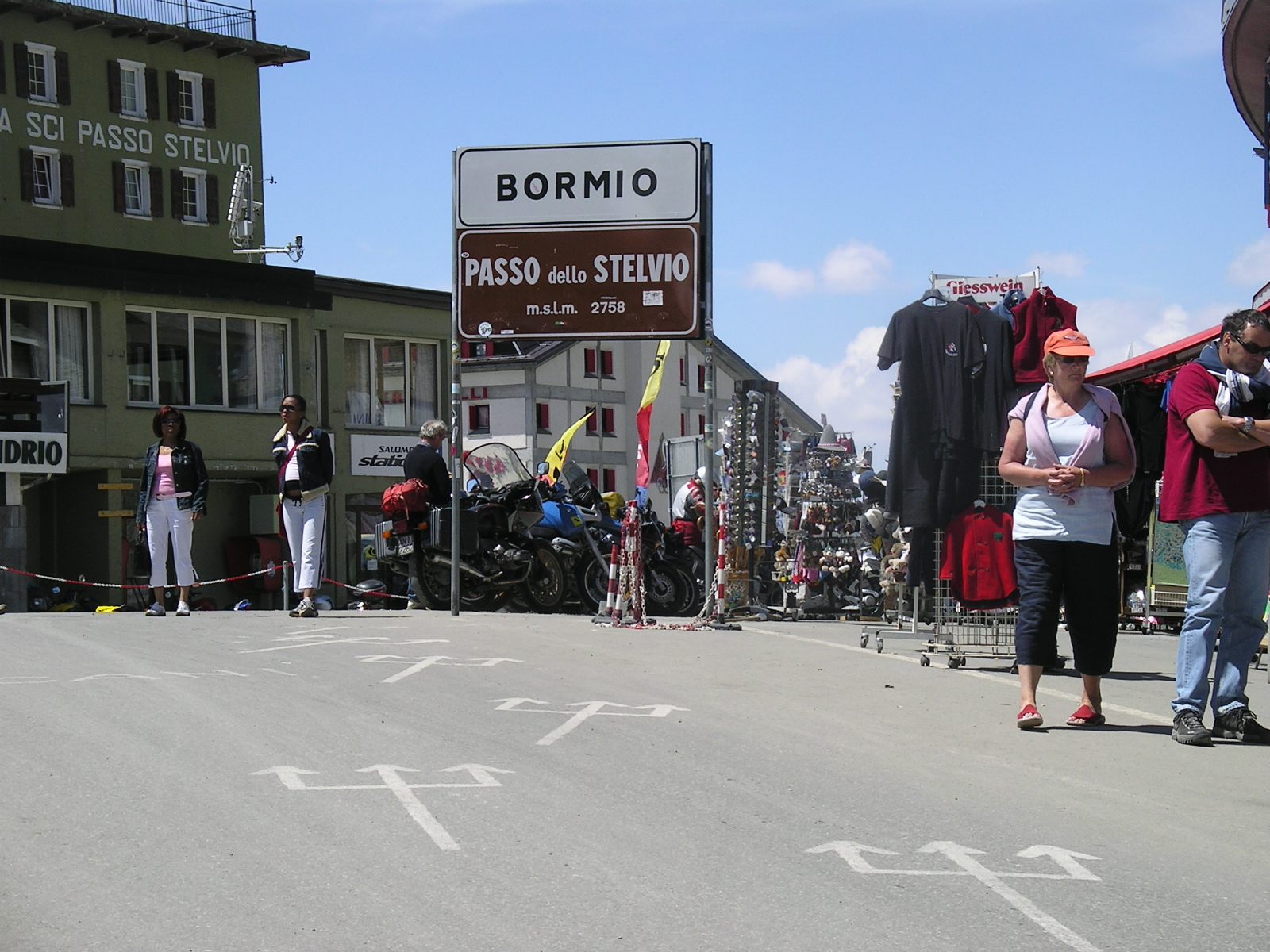 Passo dello Stelvio, 2758 meters on sea level, Bormio, Italy.